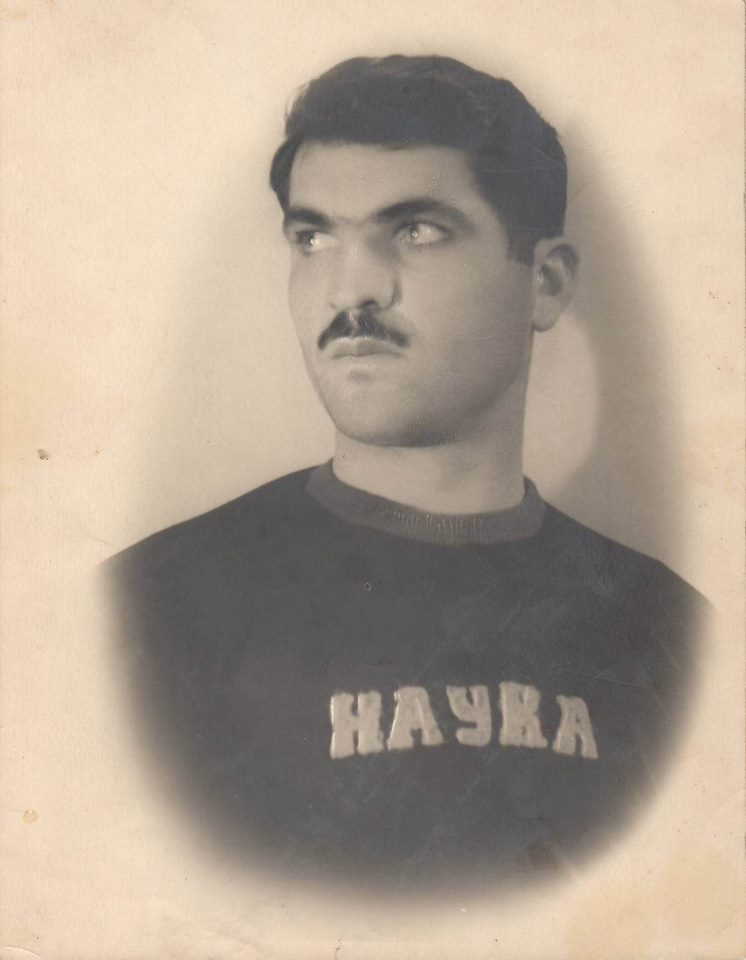 შოთა ჩიკვაიძე